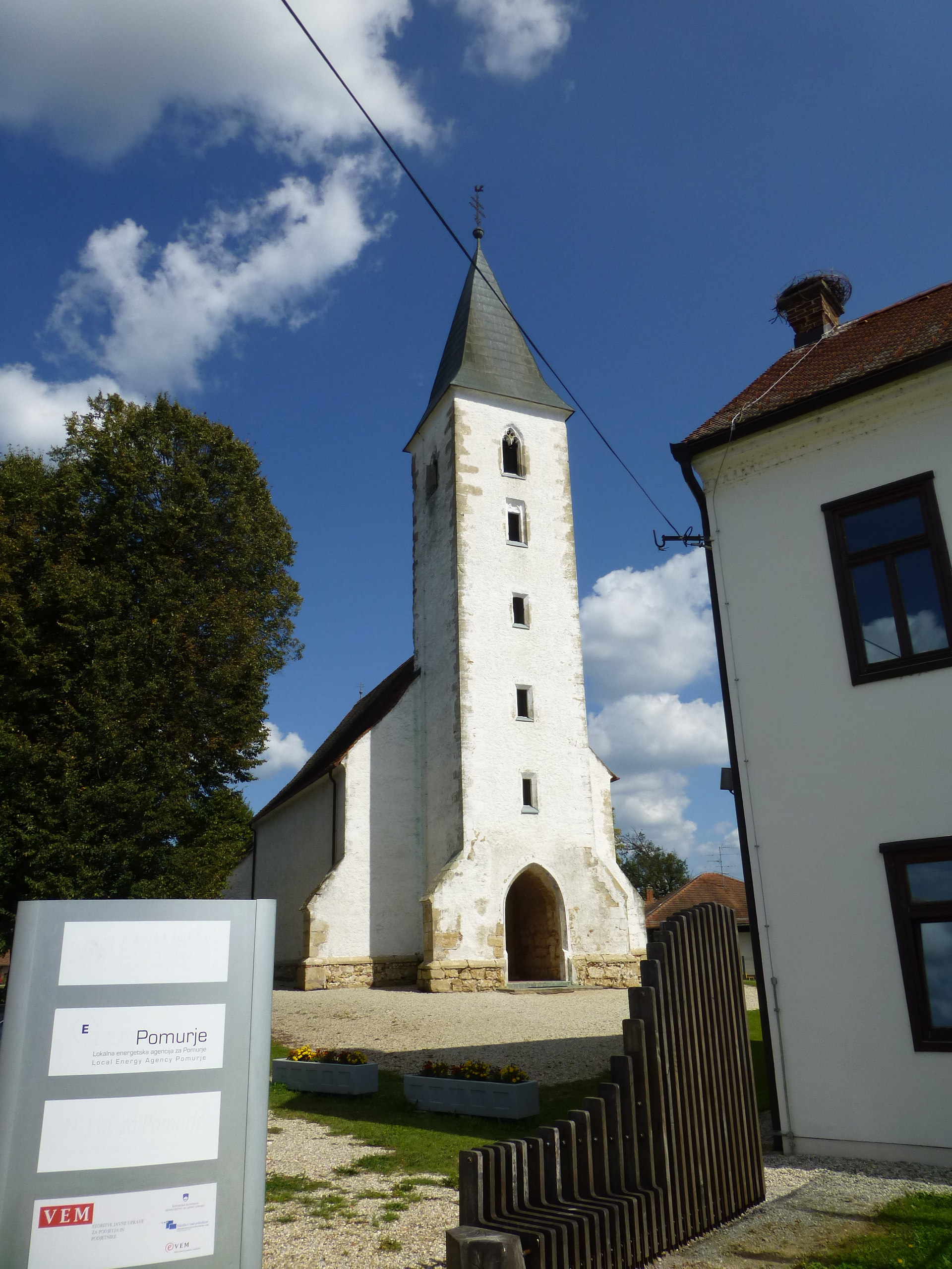 Eglise de Martjanci (Saint Martin de Tours) , 4 km de Murska Sobota, contenant des fresques de Johannes Aquilea datant de 1392.